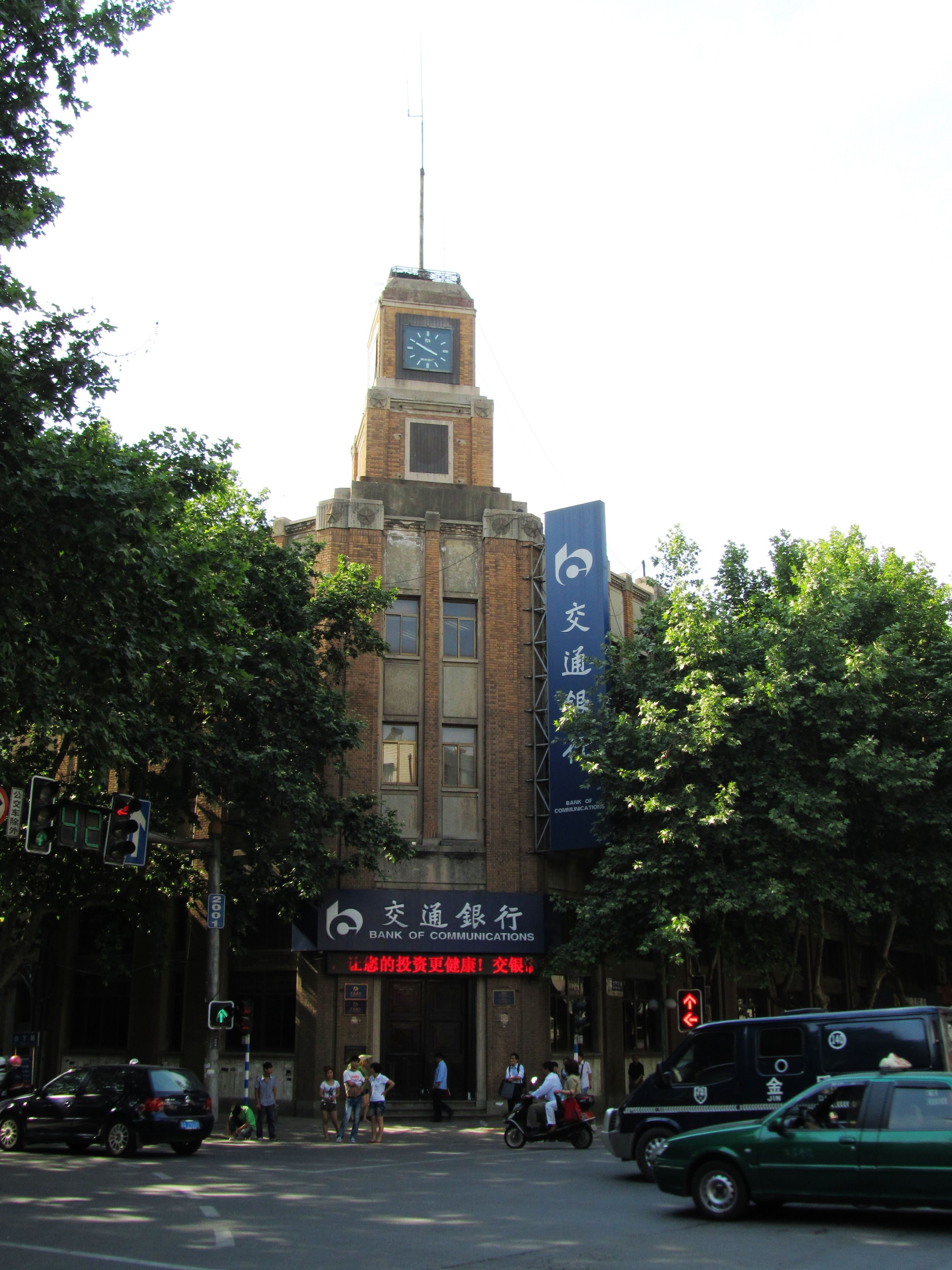 南京白下路155号，中南银行南京分行旧址。